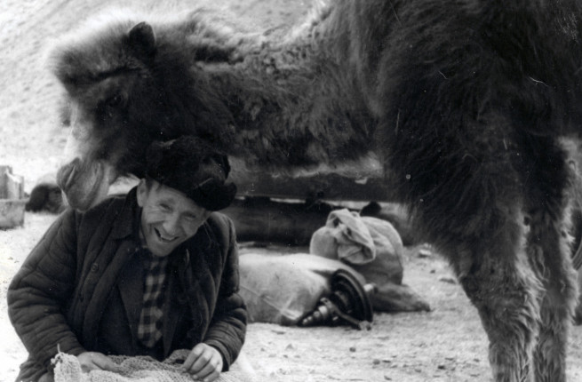 Фёдор Самохин — советский писатель, журналист, публицист, переводчик.